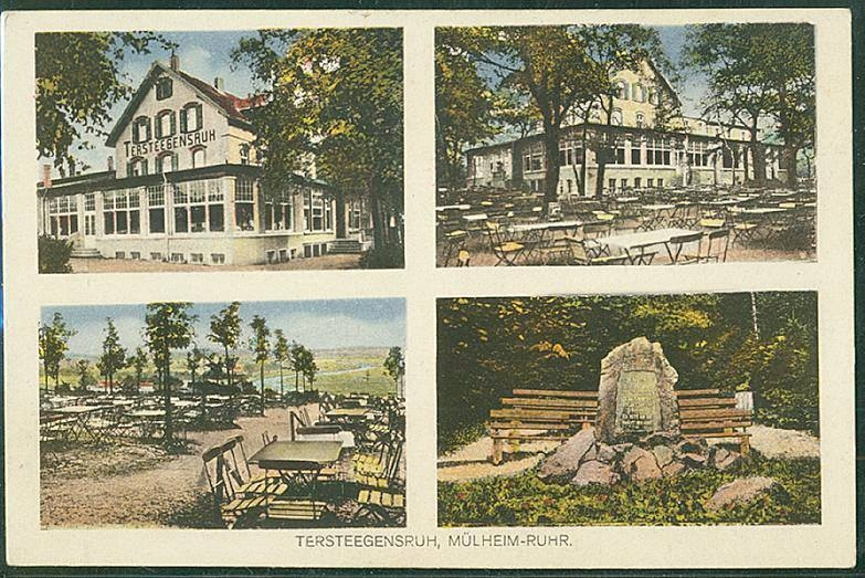 Tersteegensruh und Tersteegendenkmal um 1910 Standort Tersteegensruh:51°24′45.7″N 6°53′38.5″E / 51.412694°N 6.894028°E